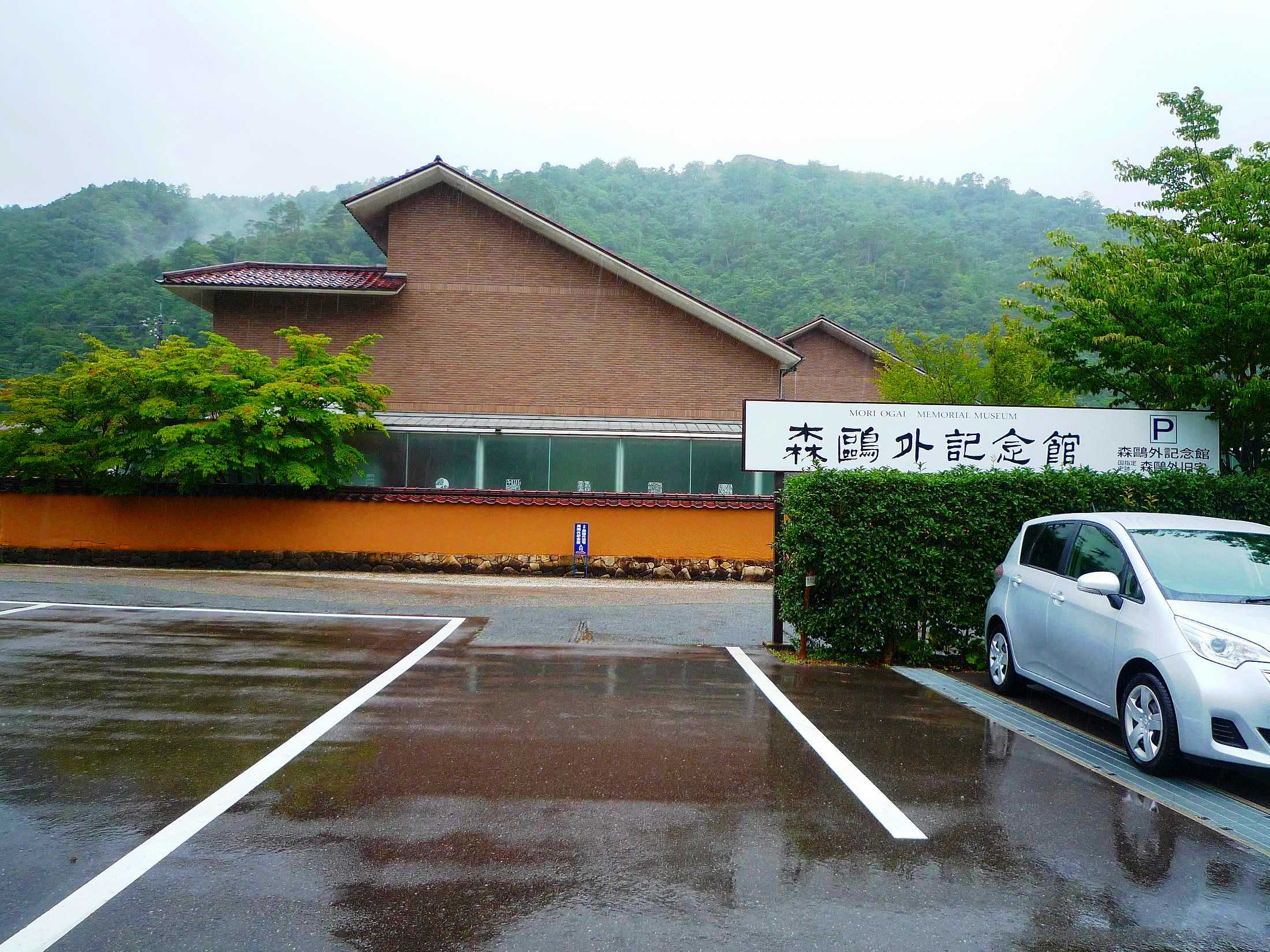 森鴎外記念館（島根県津和野町）